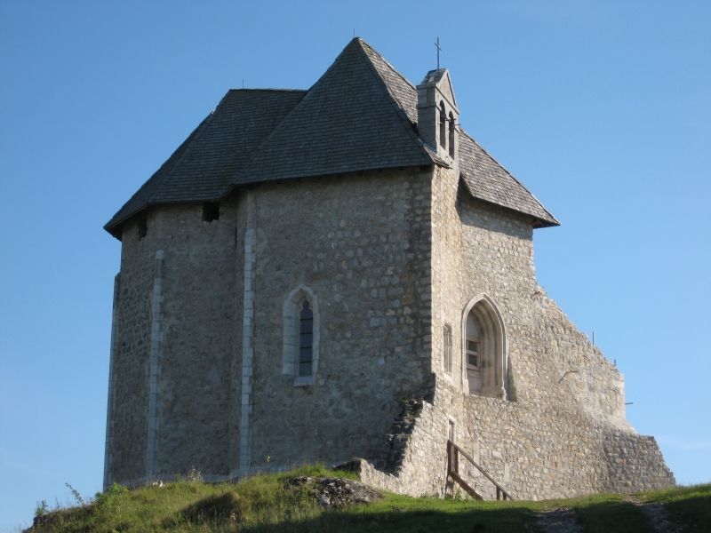 Sokolac, Brinje, Croatia